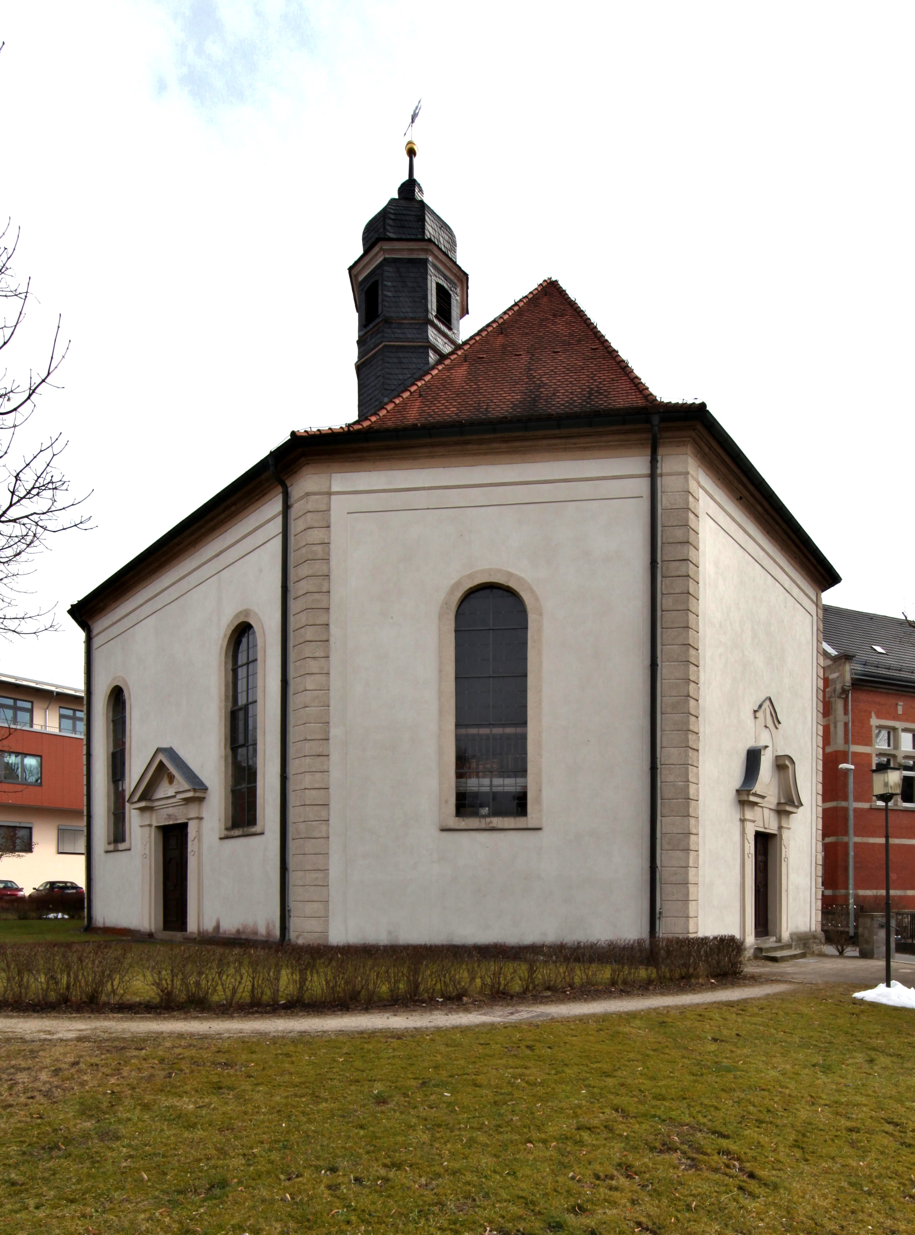 Römisch-Katholische Kirche St. Leopold in Hildburghausen